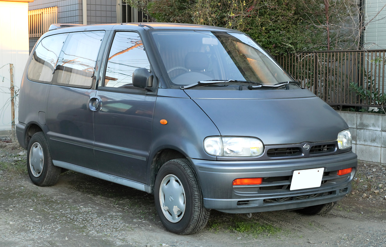 Nissan Serena 2.0 FX ( KBC23 )